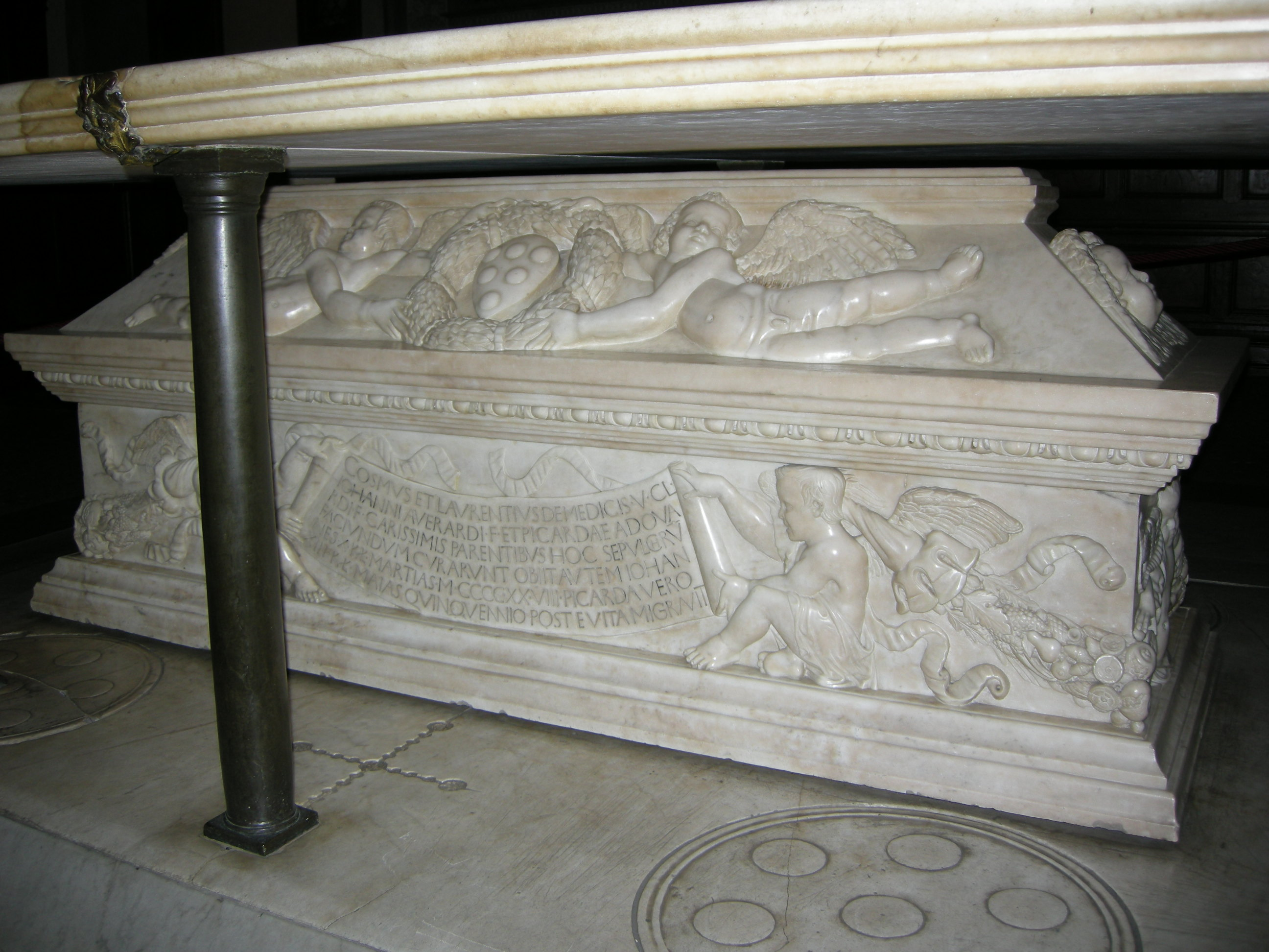 San lorenzo, sagrestia vecchia, tomba di giovanni di bicci e piccarda bueri del buggiano